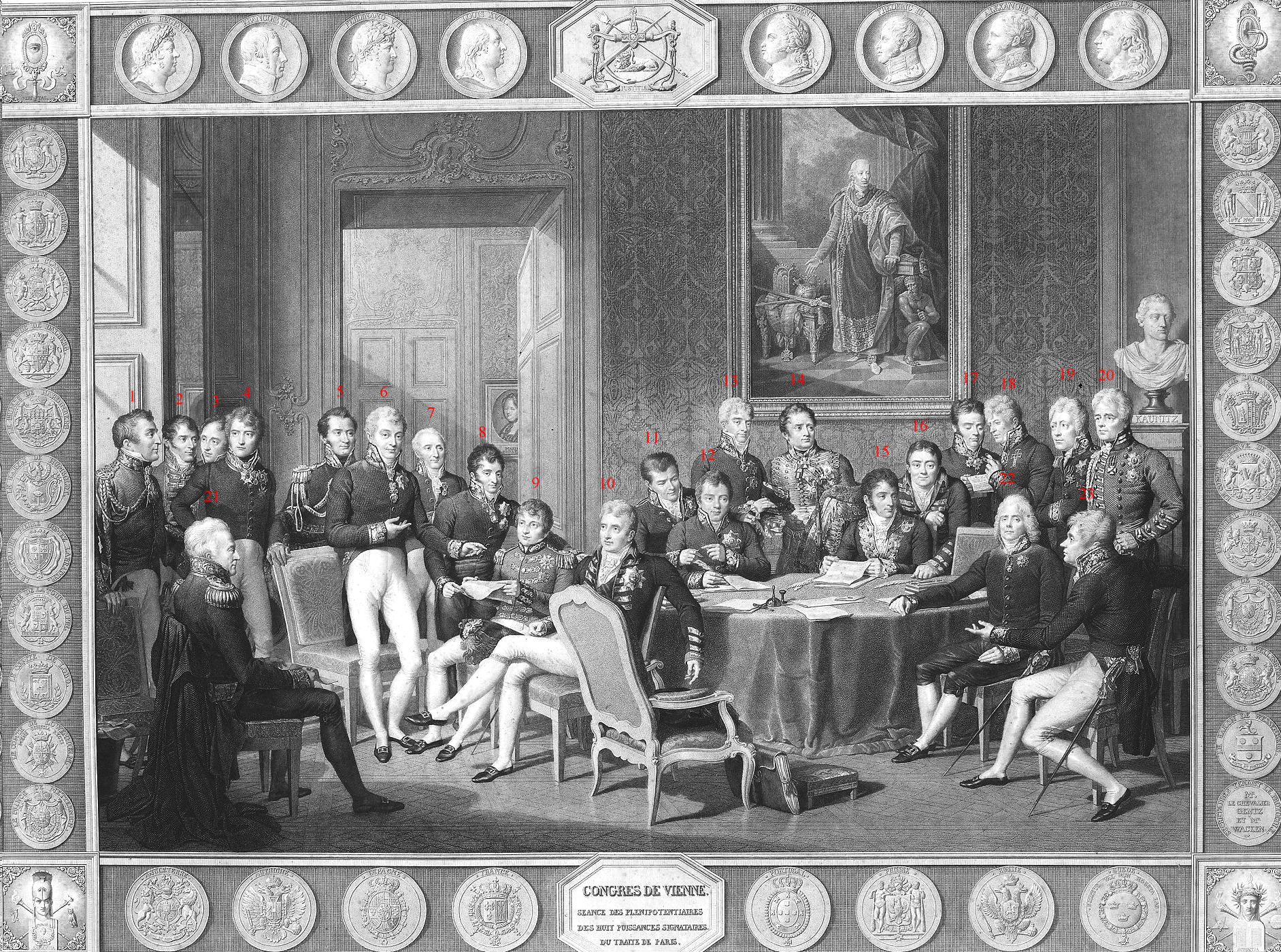 descriptive numbers: 1. Arthur Wellesley, 1st Duke of Wellington (UK) 2. Joaquim Lobo da Silveira (Portugal) 3. António de Saldanha da Gama (Portugal) 4. Count Carl Löwenhielm (Sweden) 5. Jean-Louis-Paul-François, 5th Duke of Noailles (France) 6. Prince Klemens Wenzel Nepomuk Lothar von Metternich (Austria) 7. Frédéric-Séraphin de La Tour du Pin Gouvernet (France) 8. Count Karl Robert Nesselrode (Russia) 9. Pedro de Sousa Holstein, 1st Count, 1st Marquess and 1st Duke de Palmela (Portugal) 10. Robert Stewart, Viscount Castlereagh (UK) 11. Emmerich Joseph de Dalberg (France) 12. Baron Johann von Wessenberg-Ampringen (Austria) 13. Prince Andrey Kirillovich Razumovsky (Russia) 14. Charles Stewart, 1st Baron Stewart (UK) 15. Pedro Gómez Labrador, Marquis of Labrador (Spain) 16. Richard Le Poer Trench, 2nd Earl of Clancarty (UK) 17. Nikolaus von Wacken (Recorder) (Österreichischer Staatskanzleirat, Freiherr 1823) 18. Friedrich von Gentz (Congress Secretary) 19. Baron Friedrich Wilhelm Christian Karl Ferdinand von Humboldt (Prussia) 20. William Schaw Cathcart, 1st Earl Cathcart (UK) 21. Prince Karl August von Hardenberg (Prussia) 22. Charles Maurice de Talleyrand-Périgord, 1st Sovereign Prince de Bénévent (France) 23. Count Gustav Ernst von Stackelberg (Russia)